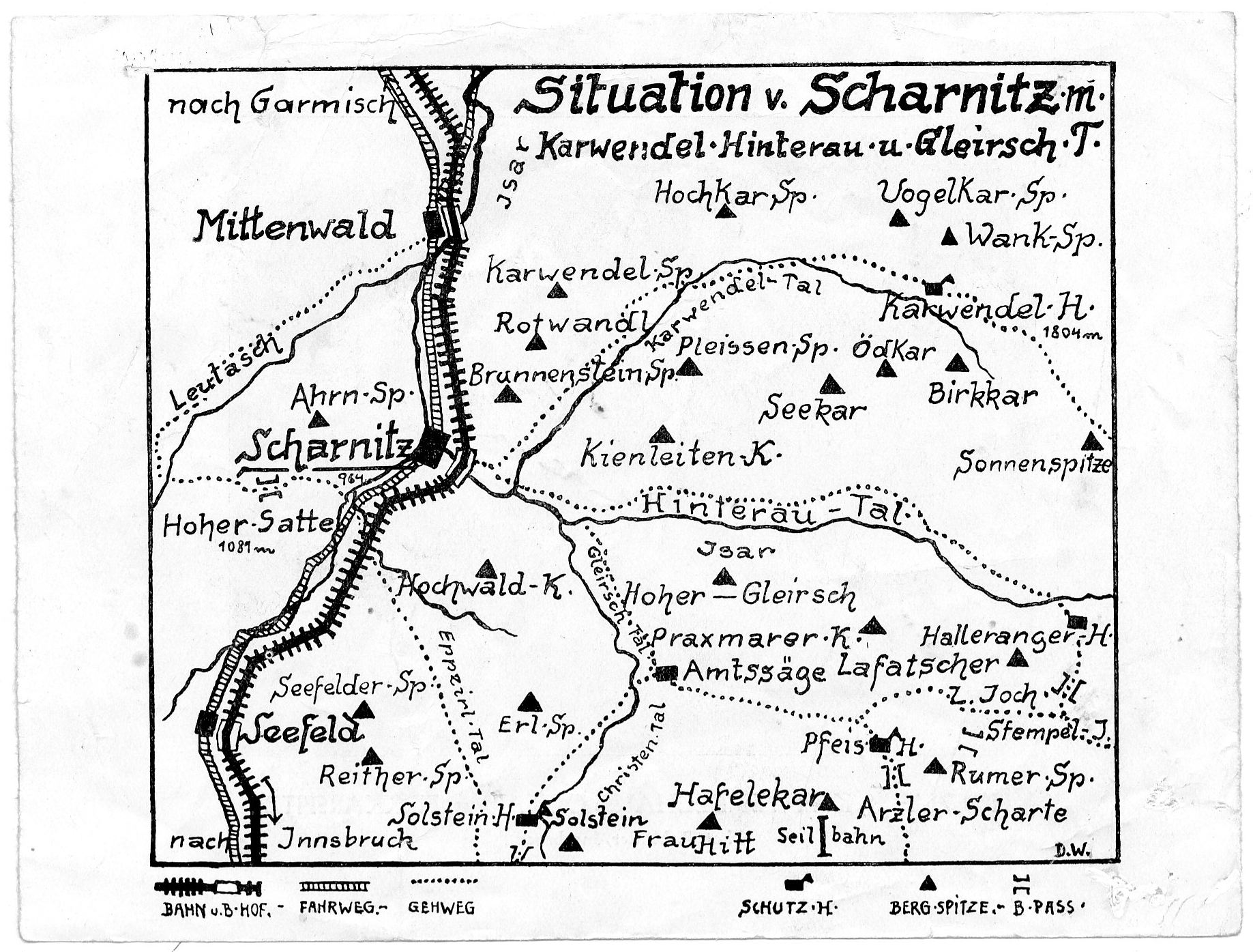 Das Gemeindegebiet von Scharnitz um 1900